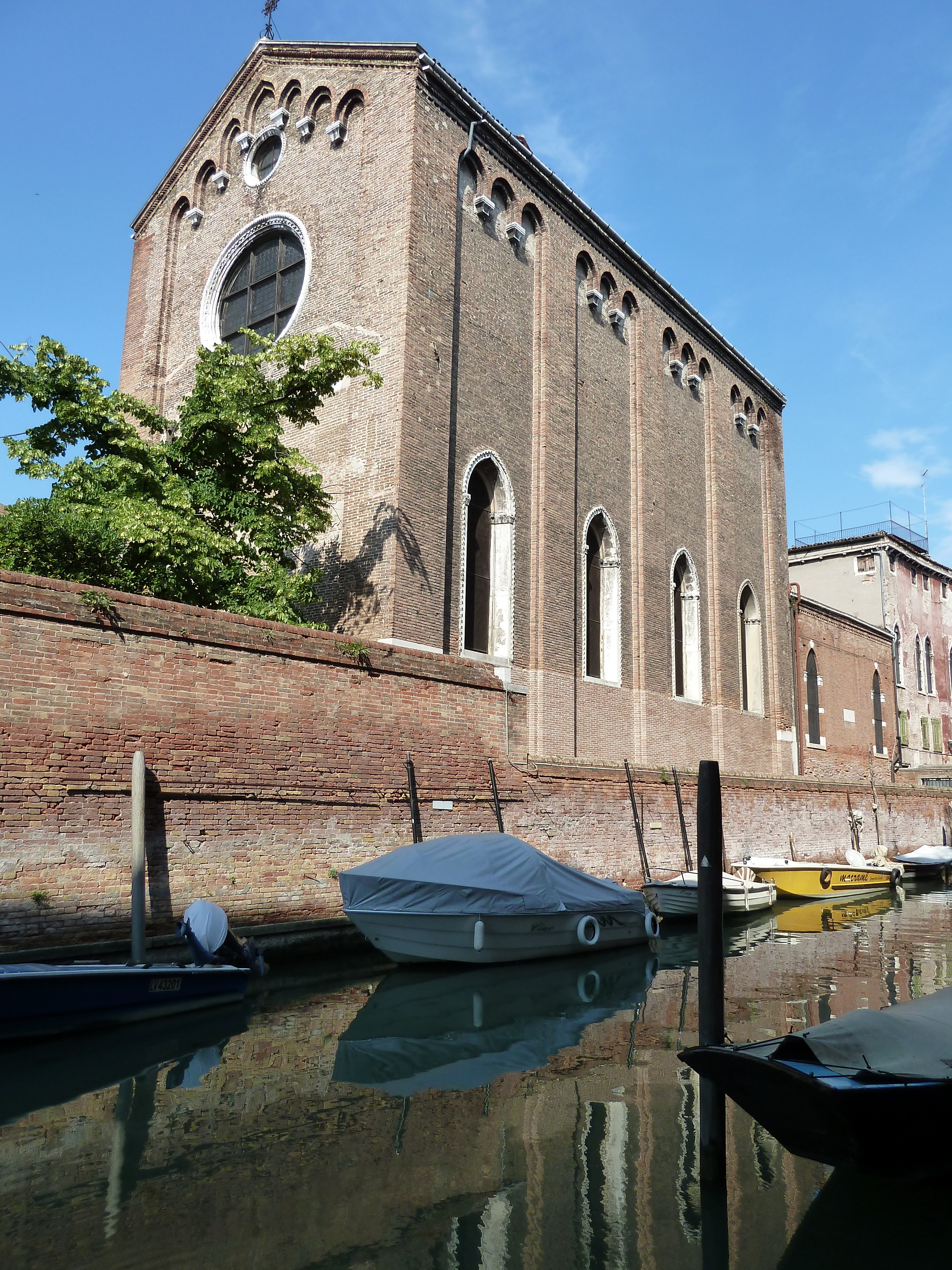 Chiesa dei Servi (Venice)